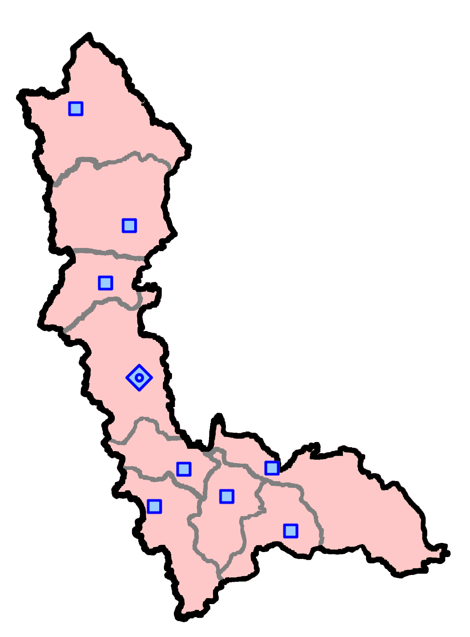 حوزه‌های انتخاباتی استان آذربایجان غربی برای انتخابات مجلس شورای اسلامی